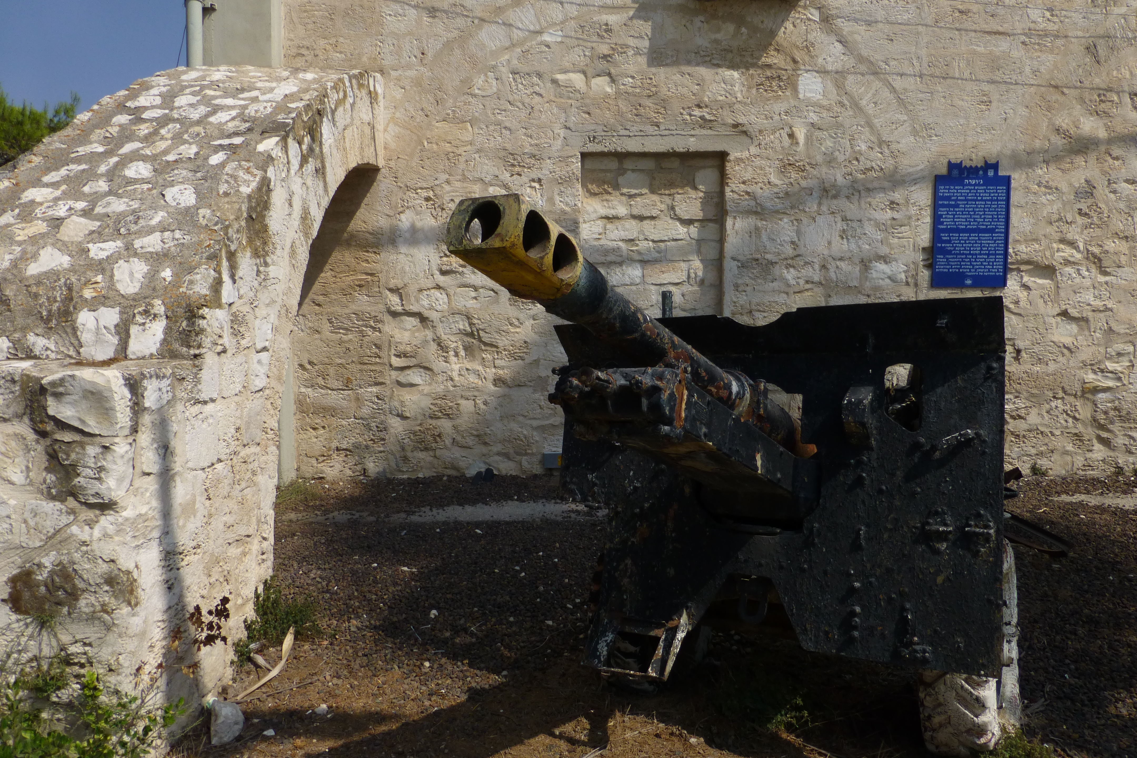 ג'וערה הוא בסיס גדנ"ע ומוזיאון הנמצאים על גבעה ברמות מנשה, במיקום היסטורי ששימש בעבר כבסיס ההדרכה המרכזי למפקדים של ארגון "ההגנה". שמה העברי של הגבעה הוא "גבעת נֹח".